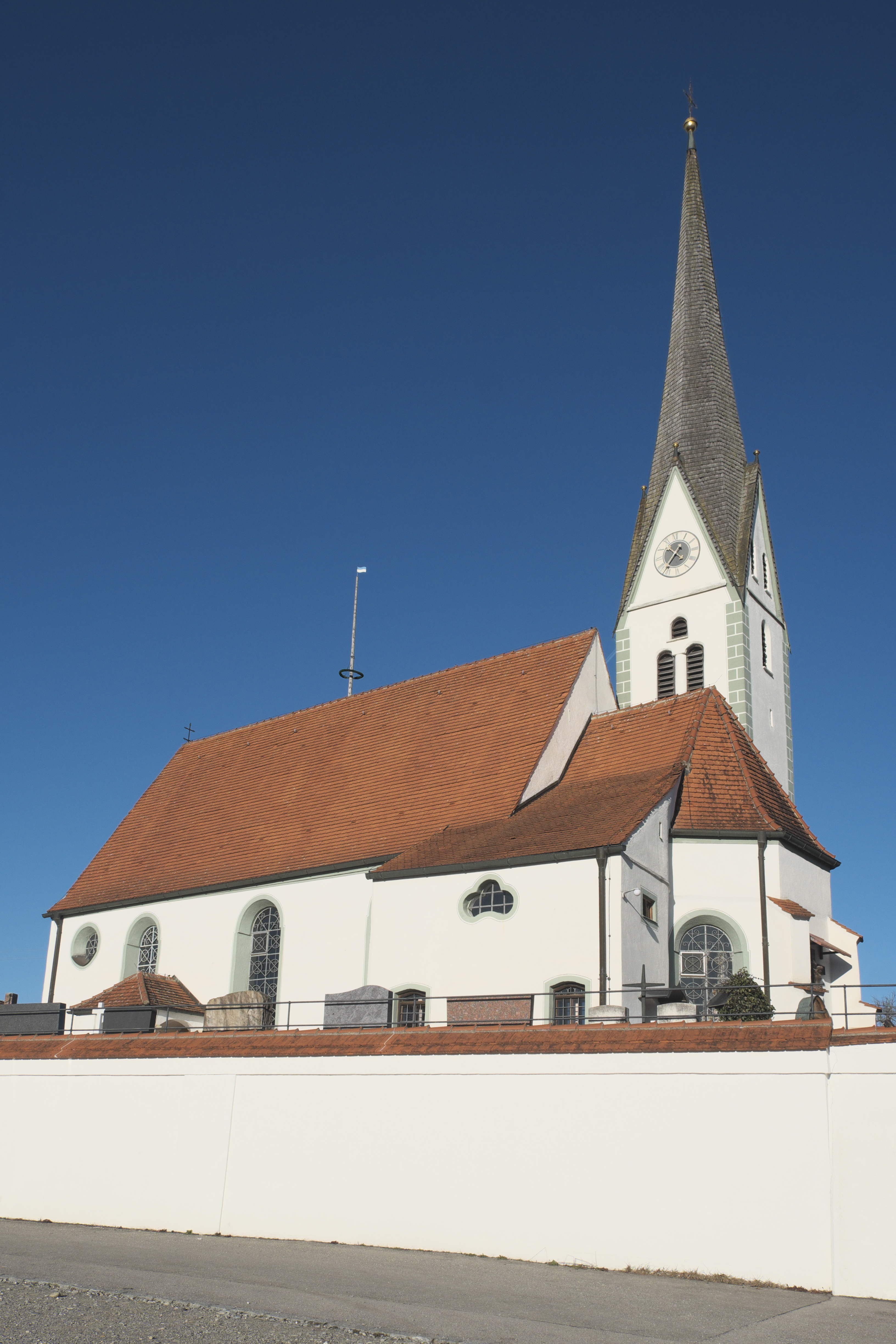 Katholische Pfarrkirche Zur Schmerzhaften Muttergottes in Unterfinning (Finning) im oberbayerischen Landkreis Landsberg am Lech (Bayern/Deutschland)